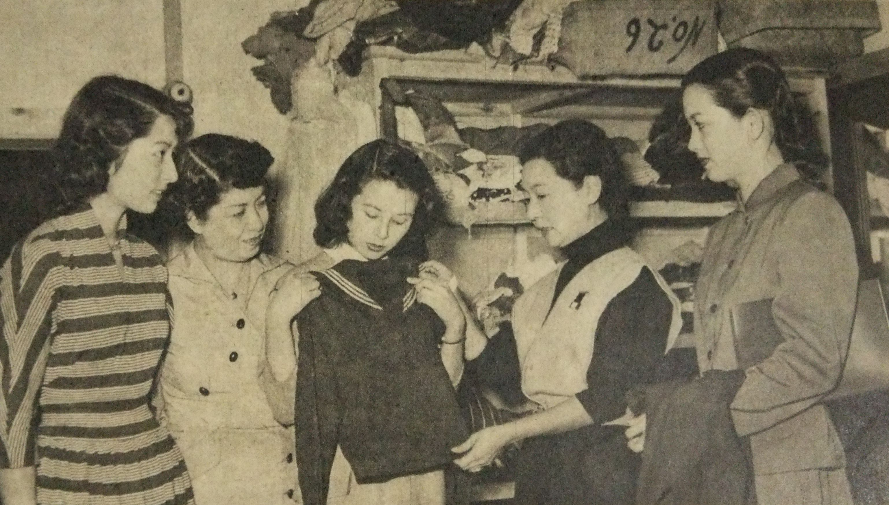 映画『恋文』の衣装合わせ（左から、香川京子、花岡菊子、久我美子、田中絹代、関千恵子）